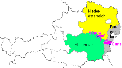 Lageskizze Semmeringfenster, Bernsteiner und Günser Gebirge. mit Ortslage von Mürzzuschlag und Rechnitz